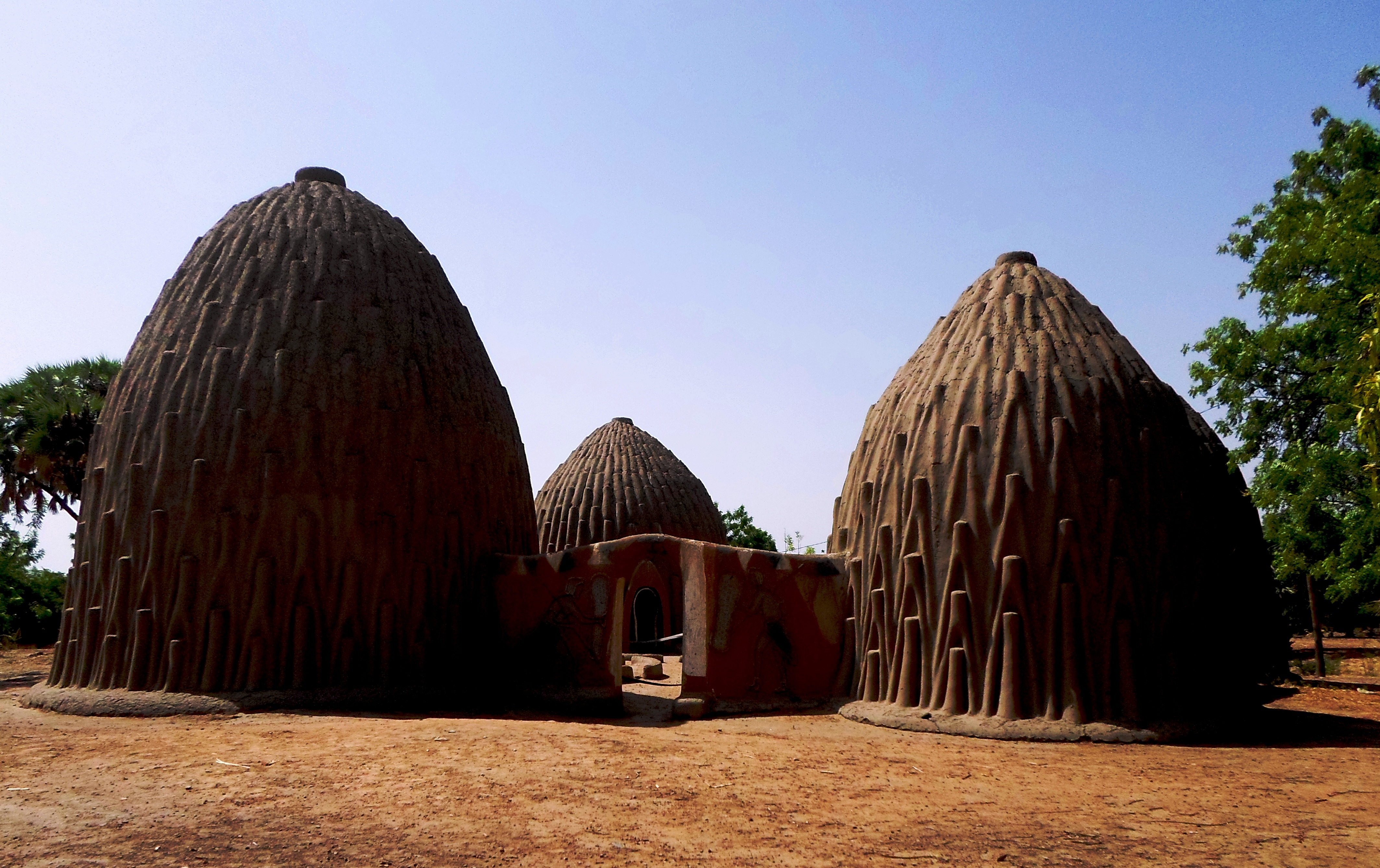 Cases traditionnelles du Peuple Mousgoum dans le Mayo-Danay. À Mourla (MAGA)